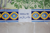 Nombr een arabe de casas del rio